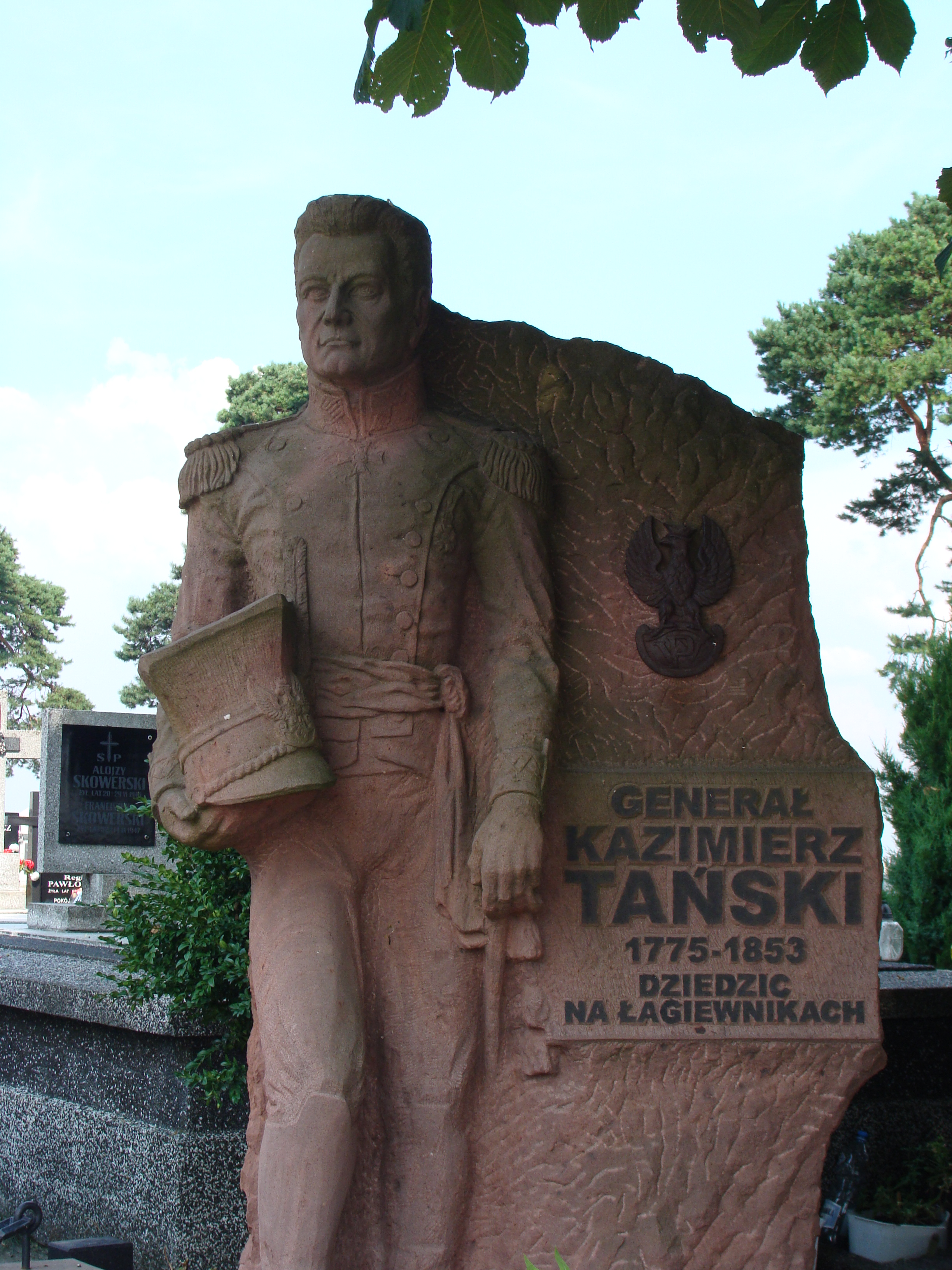 Kazimierz Tański rzeźba